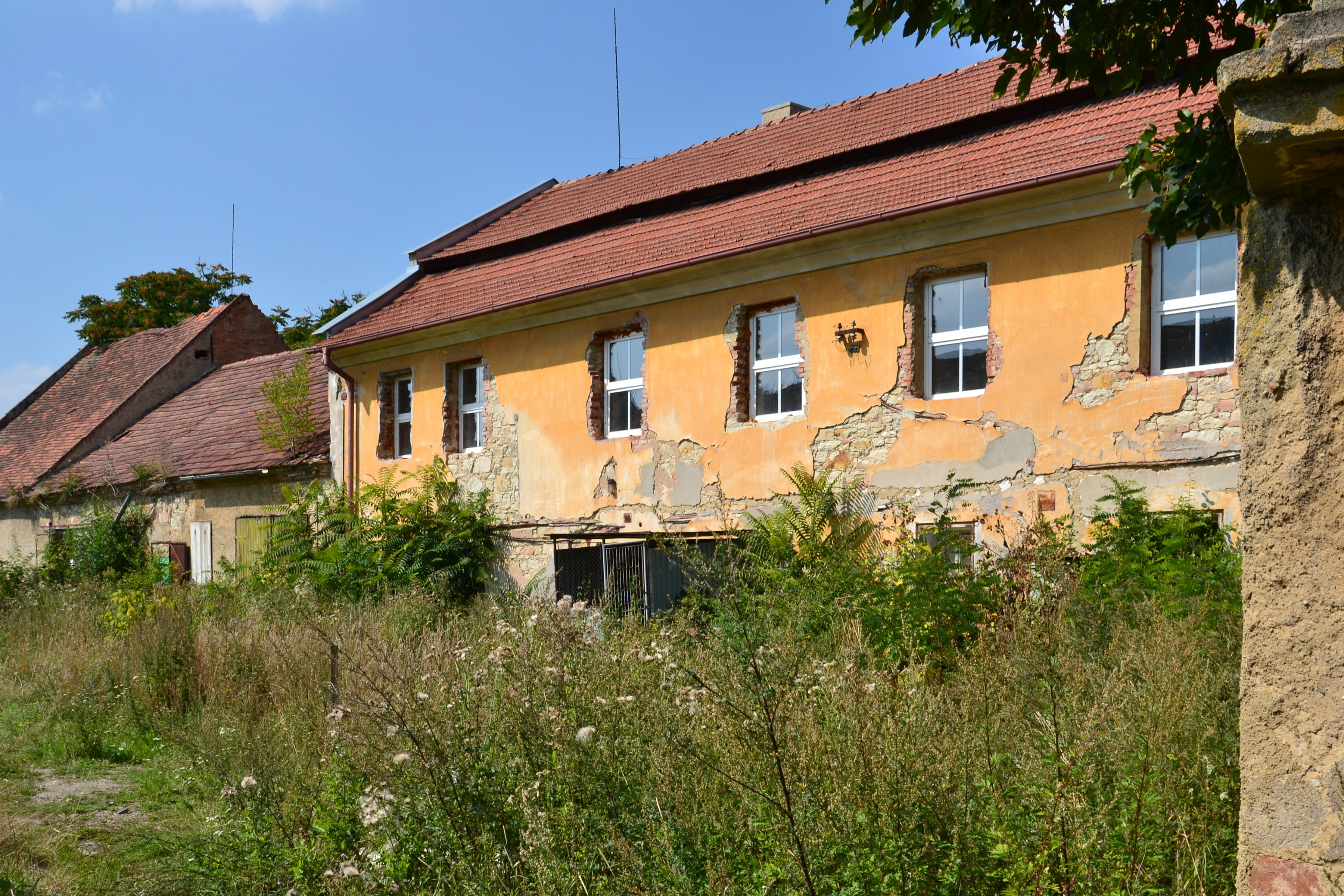 Nádvorní průčelí milošického zámku